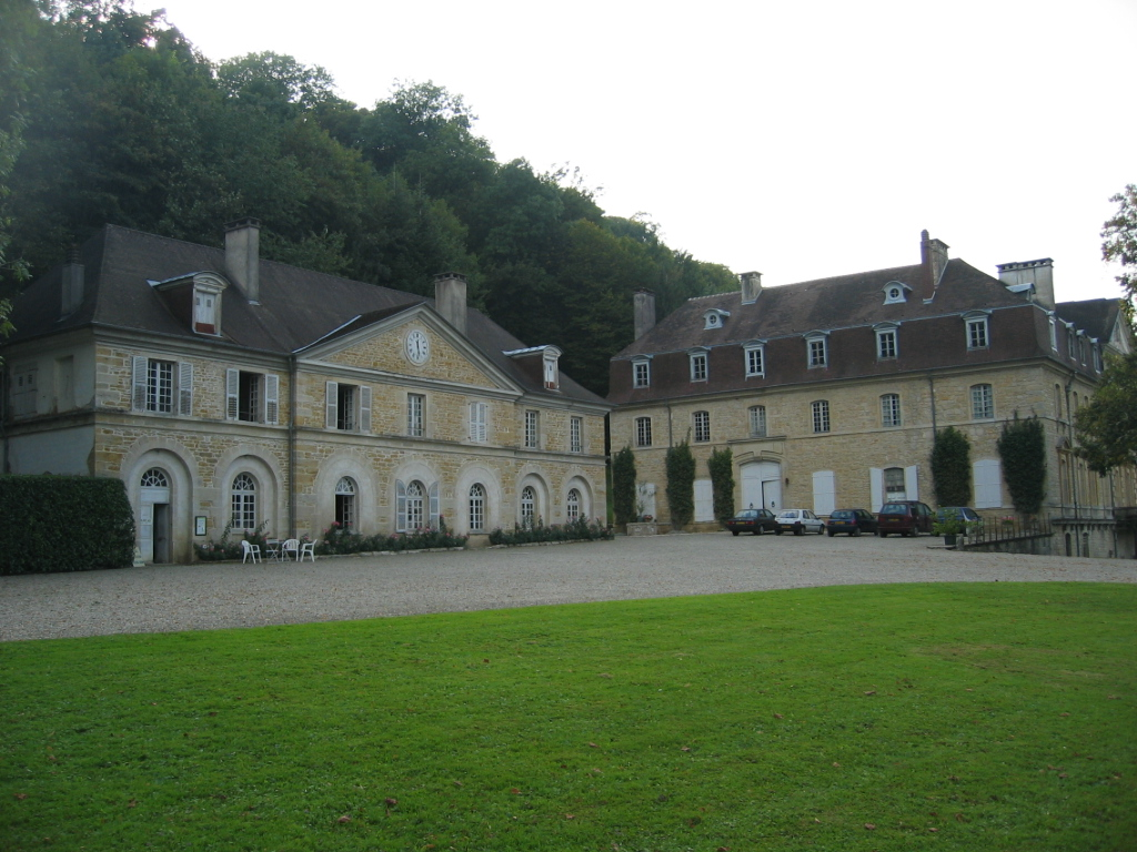 Chateau de Arlay dans le Jura - France